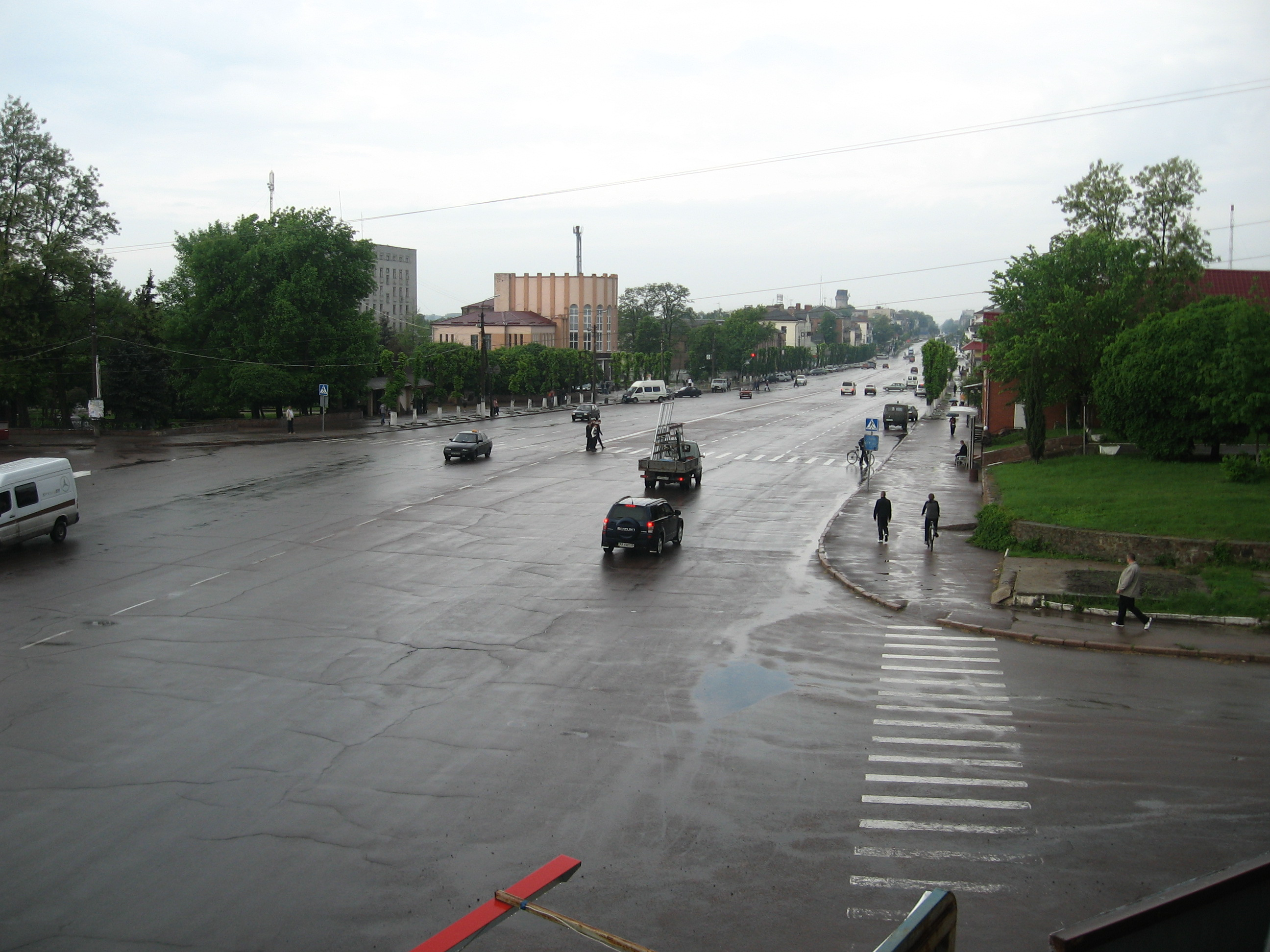 Біля краєзнавчого музею